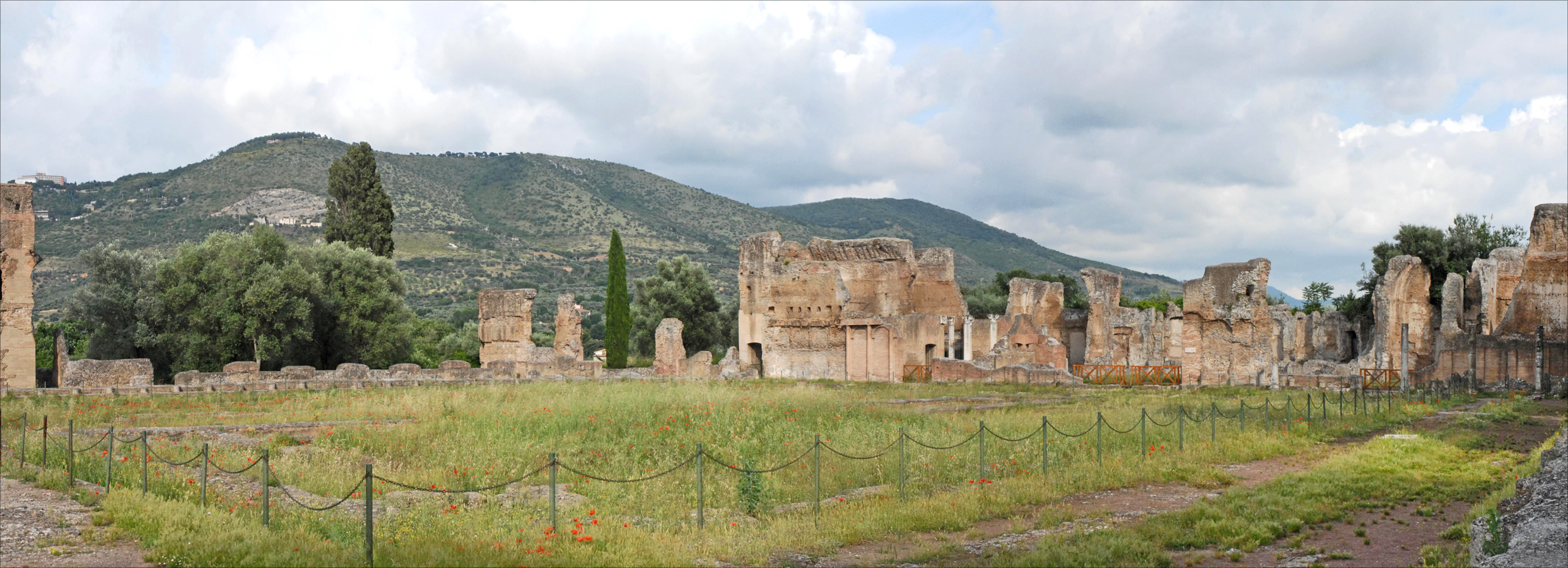 La Piazza d'Oro Ce panoramique montre une place rectangulaire entourée d'un double portique avec au fond des bâtiments qui faisaient partie du palais impérial. La compréhension de l'organisation de ces bâtiments d'apparat est difficile par des non-spécialistes et nécessite une simulation. _________________ La villa de l'Empereur Hadrien (117-138) s'étend sur les pentes des monts Tiburtini et couvre 120 hectares. Hadrien, grand voyageur, voulut évoquer les différentes parties de son Empire au sein du domaine de la Villa. La construction du complexe a duré 10 ans et le domaine comprend de nombreux bâtiments : le palais, plusieurs thermes, des bibliothèques, des logements, des plans d'eau, des portiques et promenoirs, un nymphée, des temples,... La villa a été dévastée par les invasions barbares, puis servit de carrière. Les premières fouilles ont été menées dès la Renaissance mais elles ont conduit a un pillage systématique des sculptures, mosaïques et colonnes ouvragées.